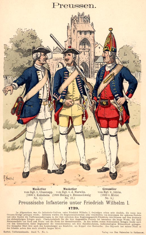 Иллюстрация Рихарда Кнотеля